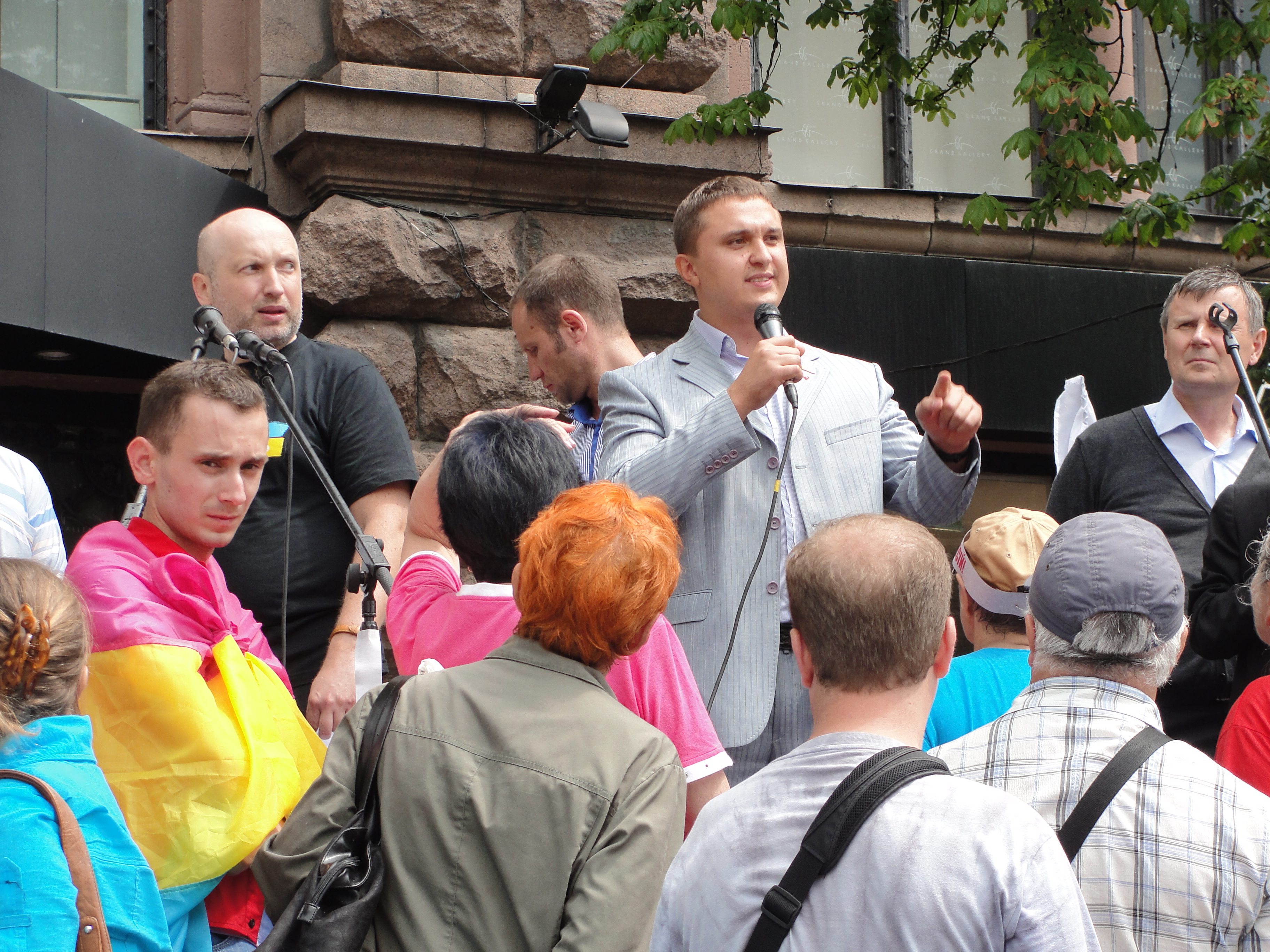 Червень 2011 року, акція протесту під час розгляду в Печерському районному суді м.Києва справи проти Юлії Тимошенко за звинуваченням у перевищенні влади та службових повноважень під час укладання «газових» контрактів із Росією